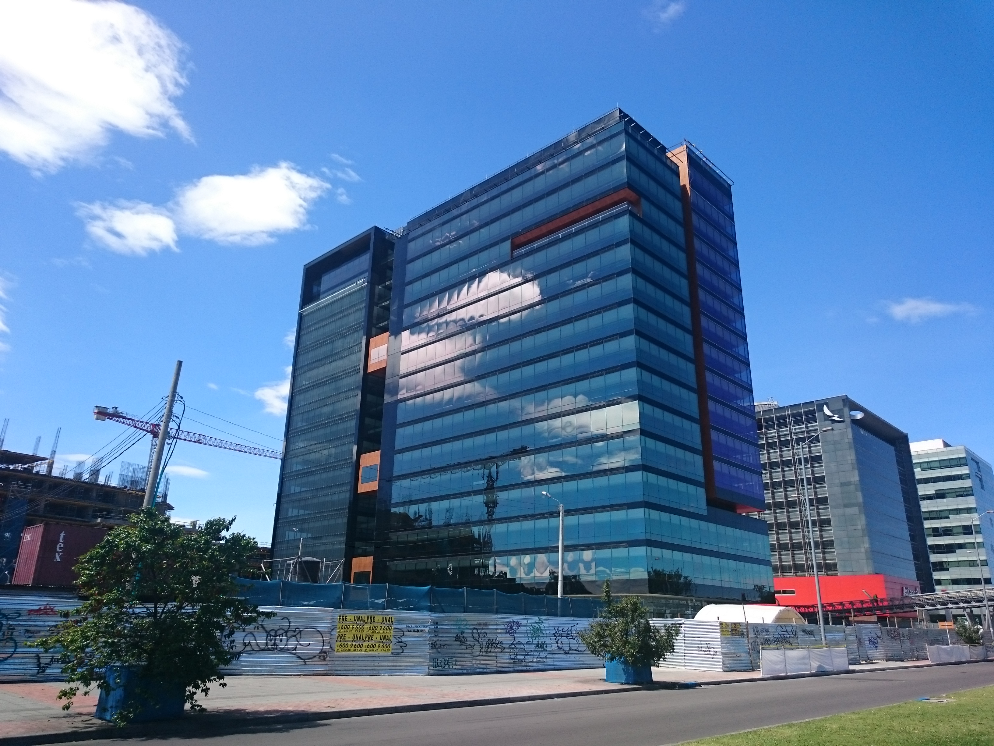 Colciencias 271215